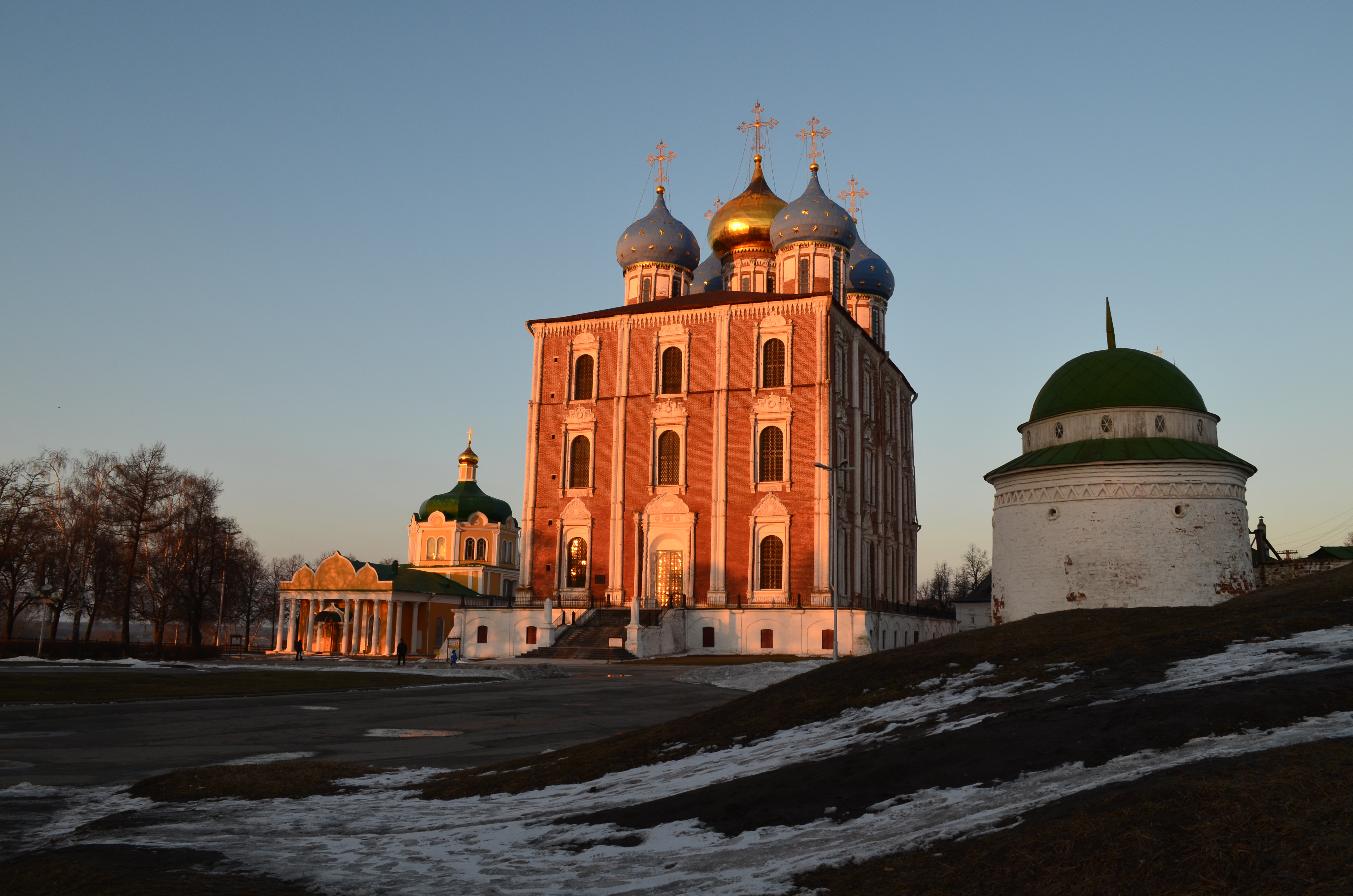 Рязанский Кремль.Успенский собор(1693-1699гг.)